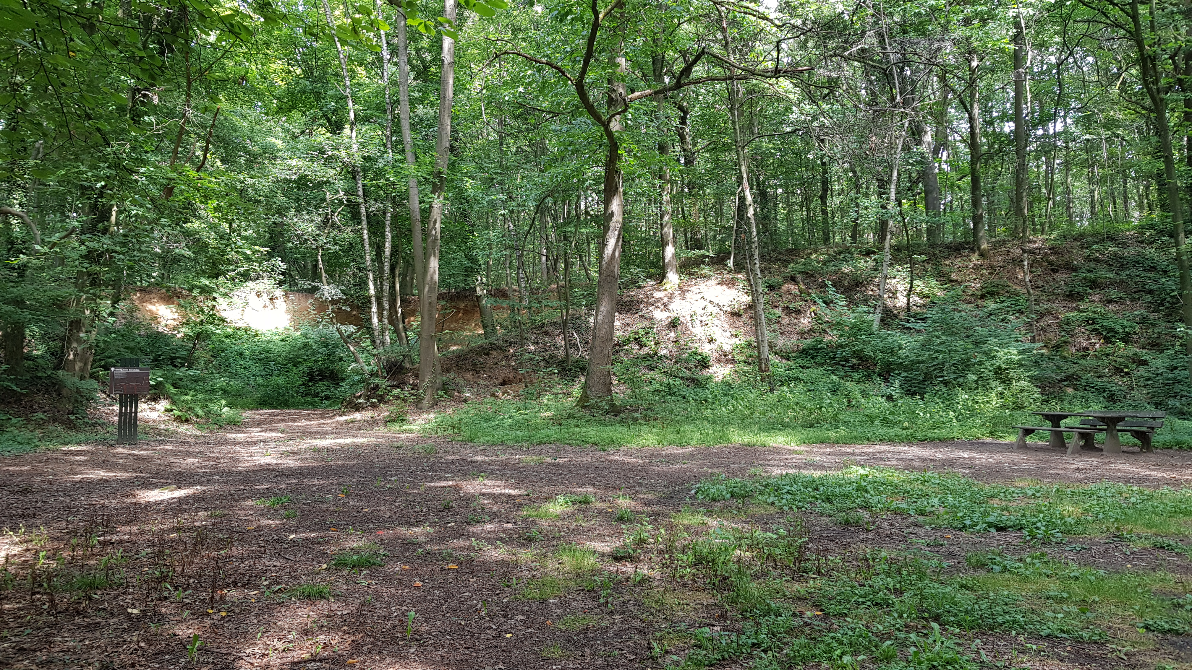 Grindgroeve Savelsbos, Gronsveld, Nederland